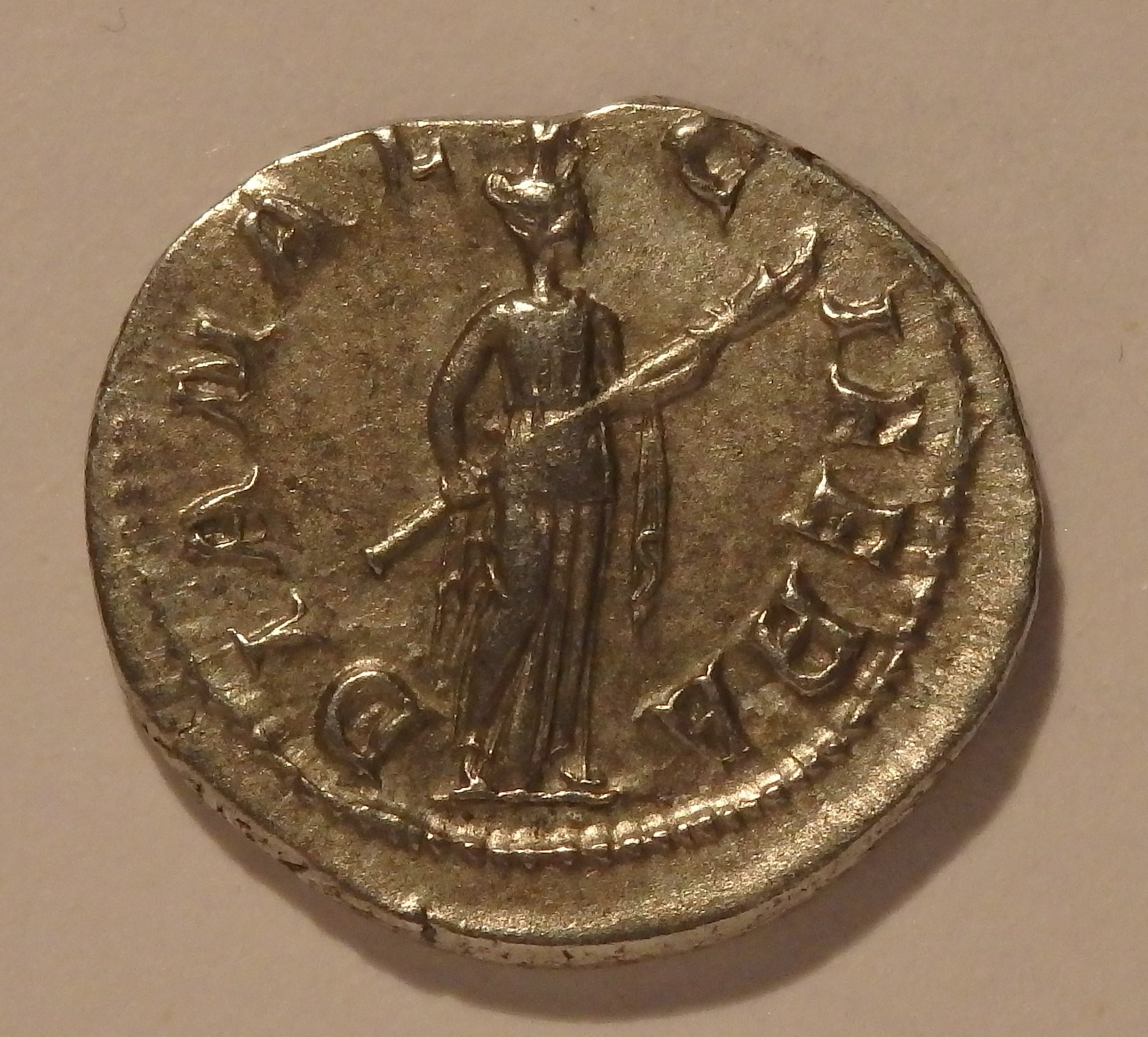 Denar, Sonderprägung auf die Hochzeit Gordianus III, Sommer 241 n. Chr., Kampmann 72.10